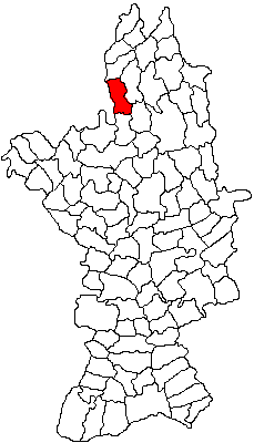 Categorie:Hărţi ale judeţului Olt